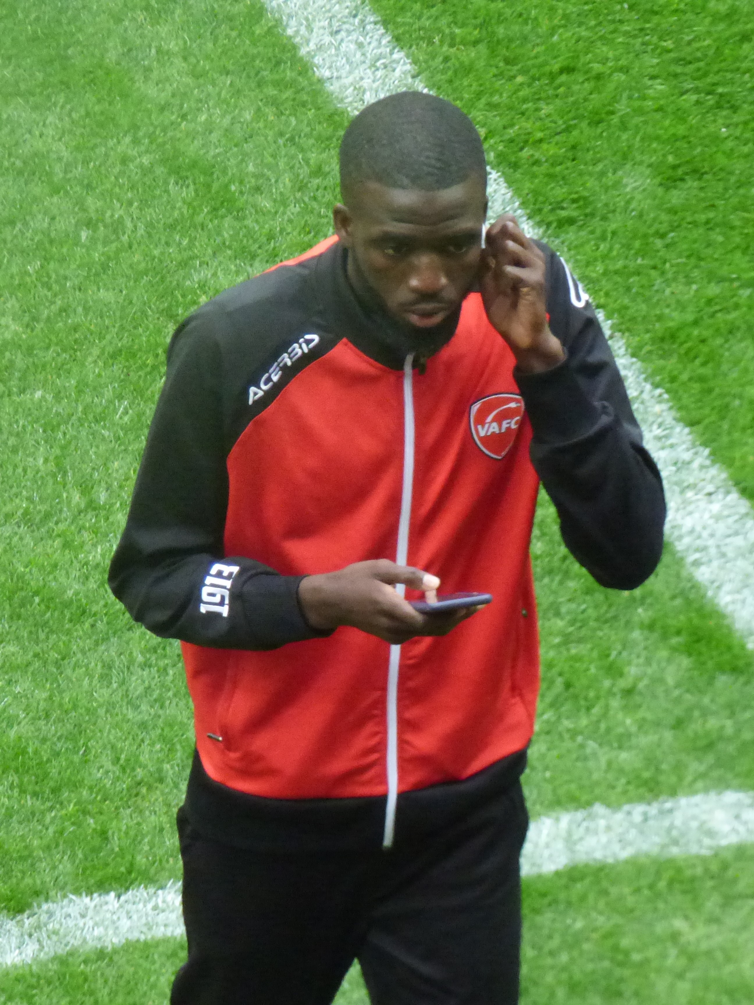 Mahamé Siby avant le match Valenciennes FC / RC Lens, comptant pour la quatorzième journée du championnat de France de Ligue 2 2018-2019, le 10 novembre 2018, au Stade du Hainaut.